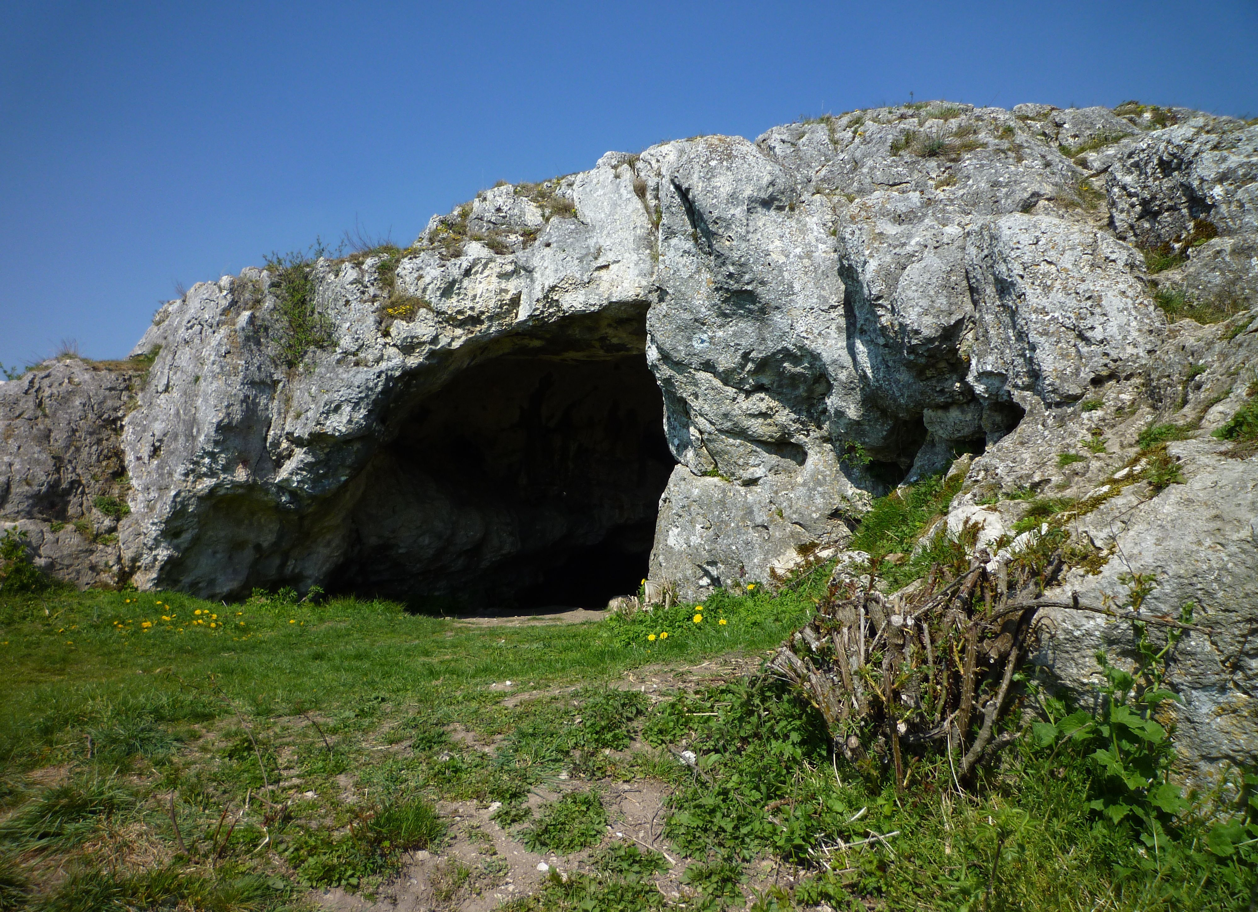 Nördlingen - Ofnethöhle auf dem Riegelberg02